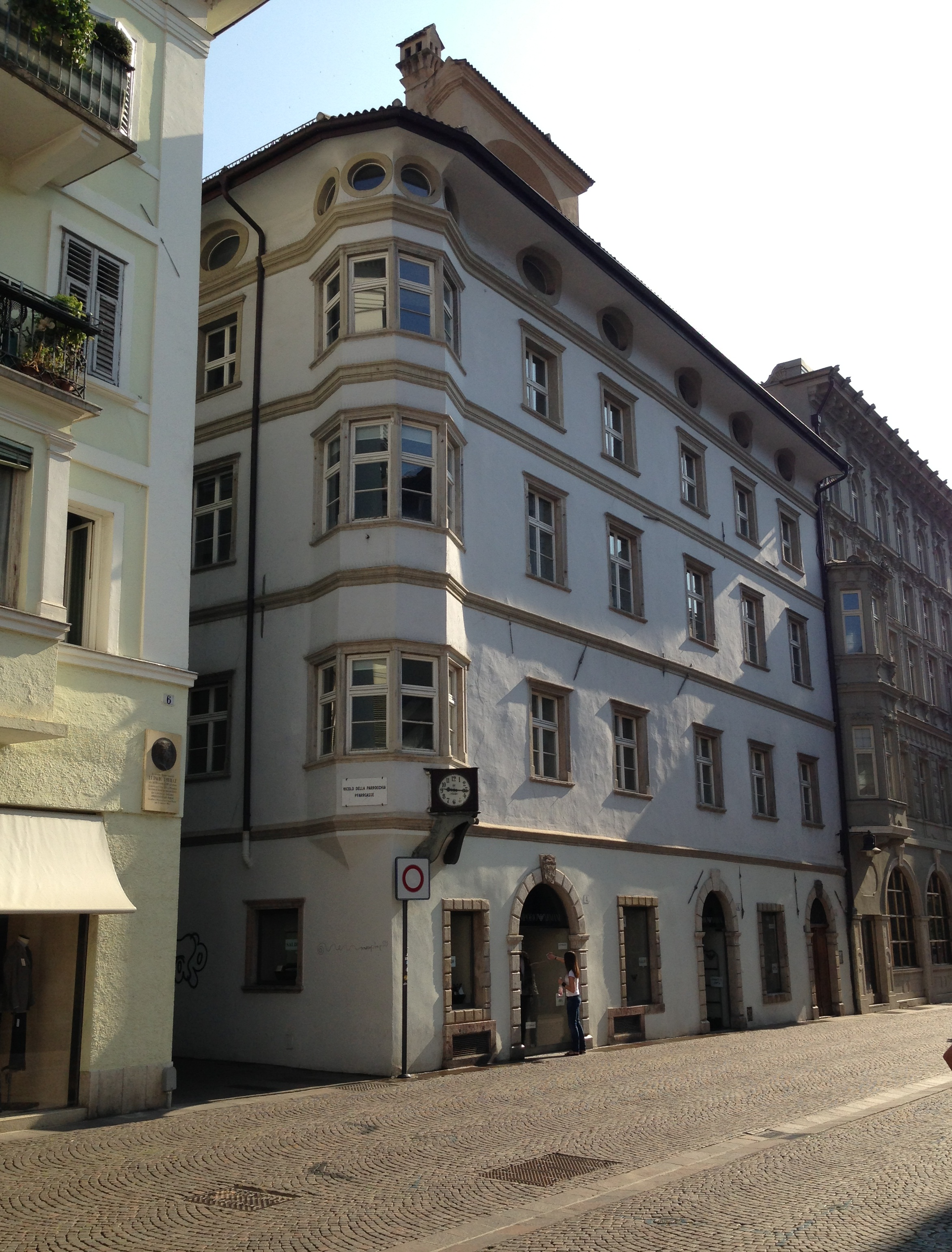 Palais Trapp in Bozen in der Mustergasse